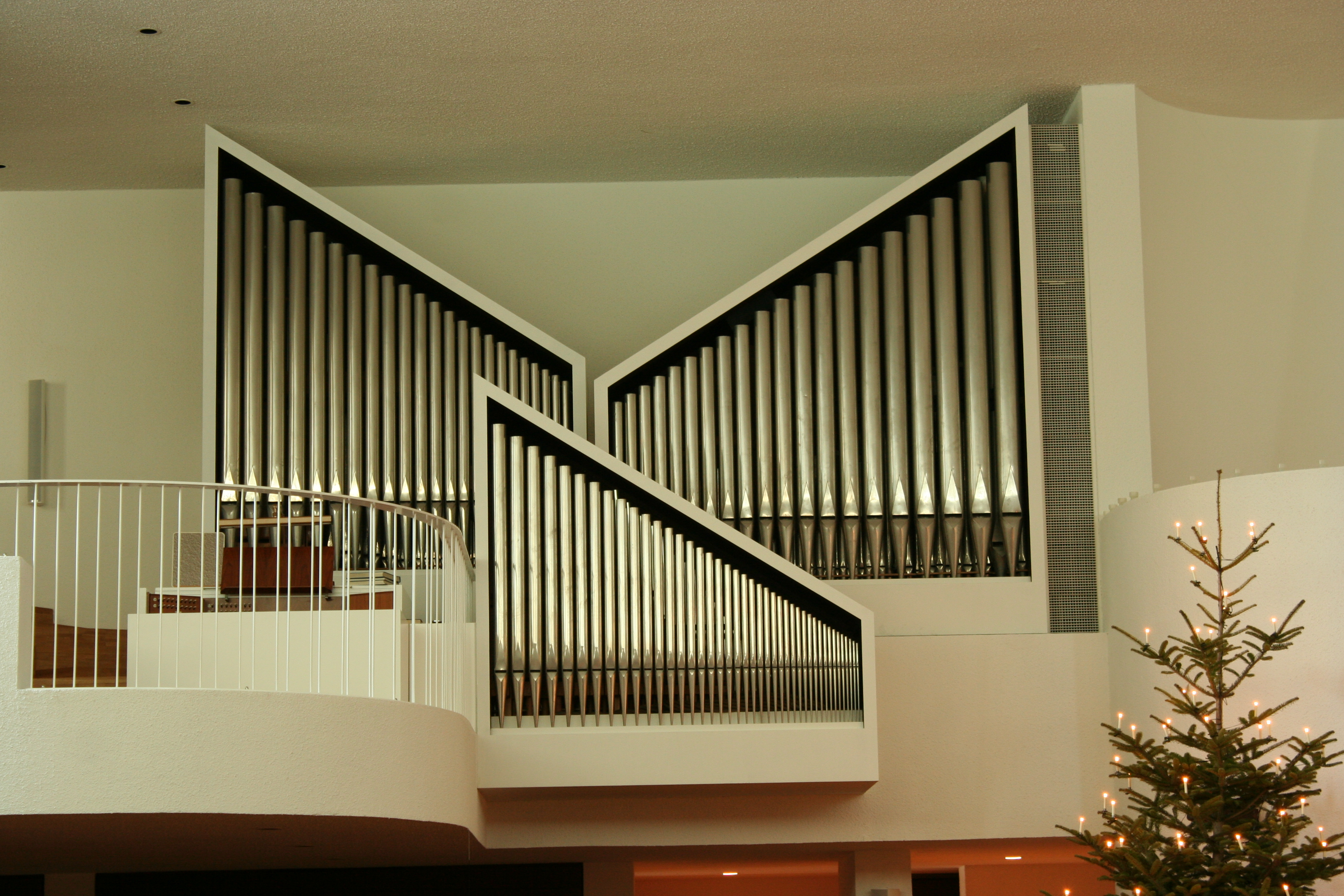 Römisch-katholische Pfarrkirche St. Ulrich Winterthur-Rosenberg, Mönch-Orgel